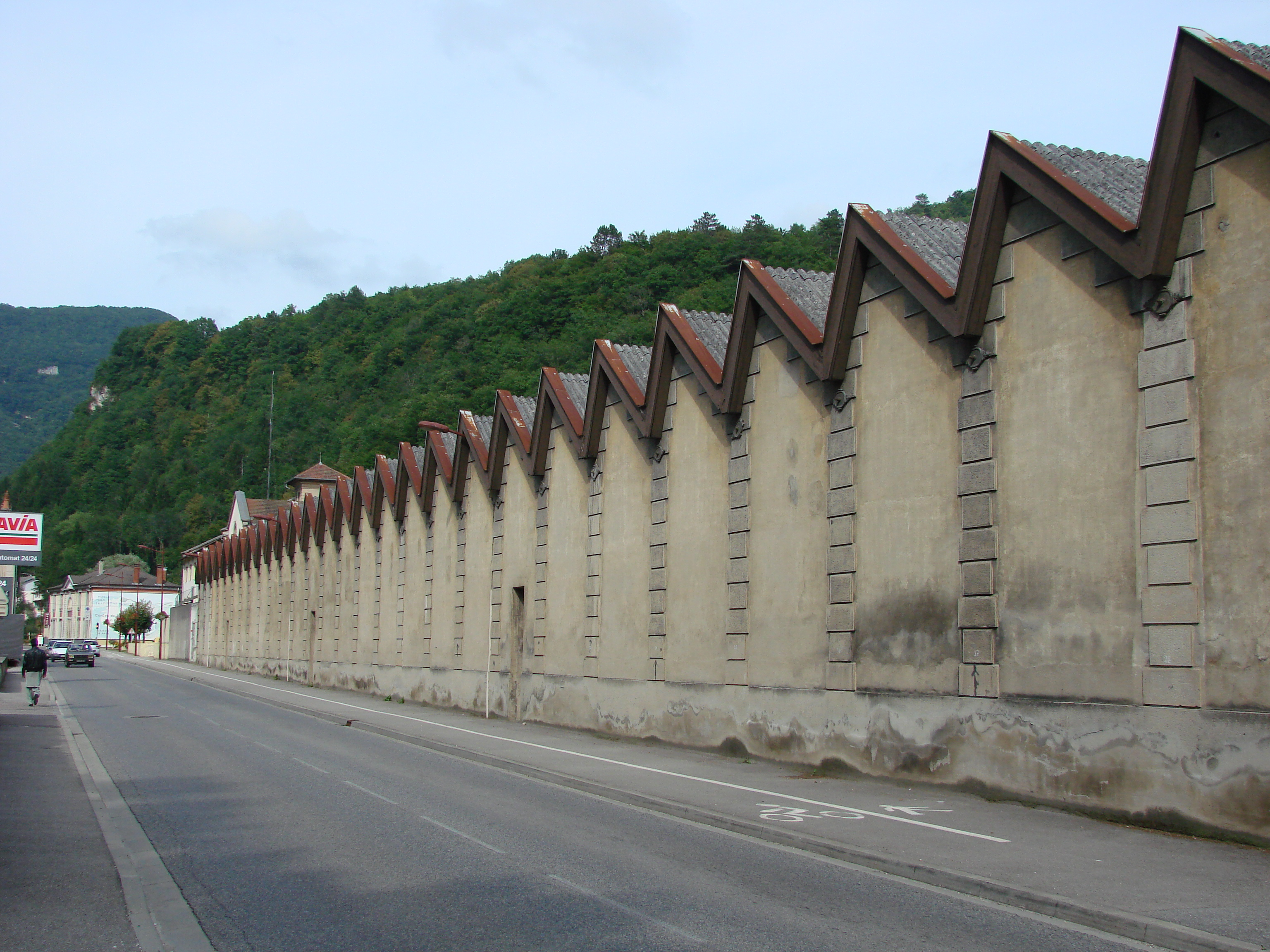 Bâtiments subsistants de la "Schappe" de Saint-Rambert-en-Bugey le 31/07/2014